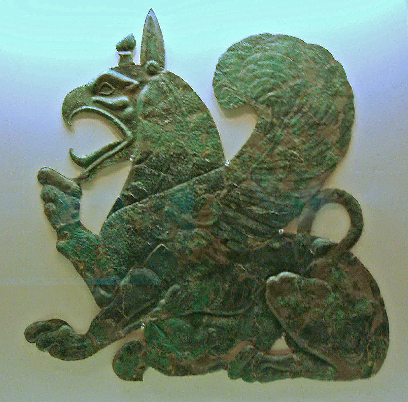 weiblicher säugender Greif aus Bronzeblech, möglicherweise Verkleidung einer Metope, Olympia